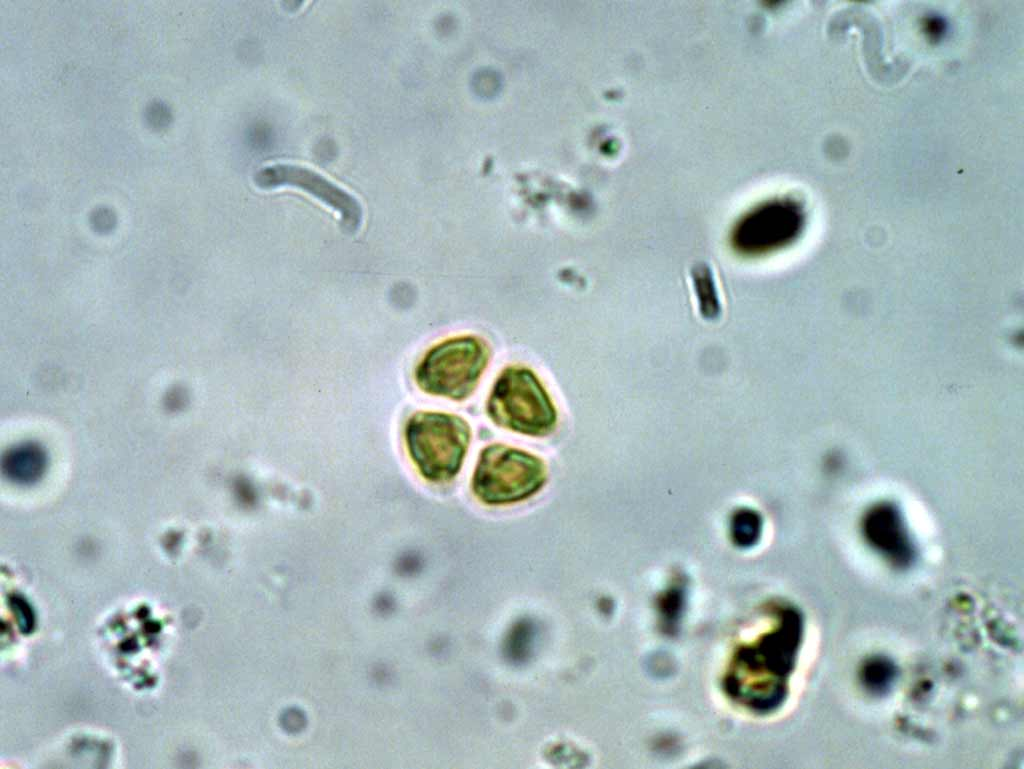 Tetrastrum glabrum